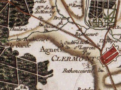 Agnetz et ses envirions, carte de cassini